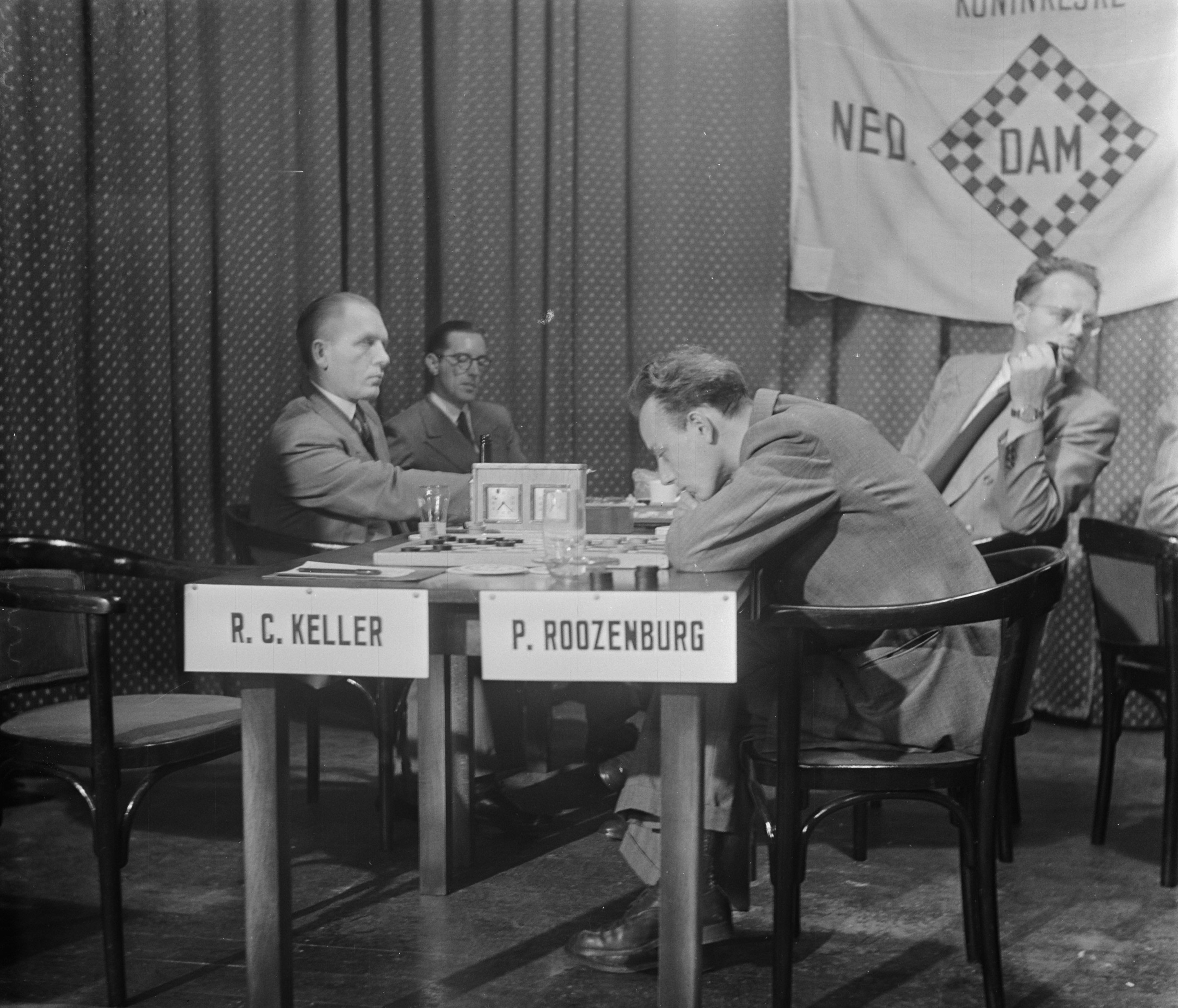 Collectie / Archief : Fotocollectie Anefo Reportage / Serie : [ onbekend ] Beschrijving : Dammen wereldkampioenschappen Roozenburg en Keller Datum : 27 september 1951 Trefwoorden : DAMMEN, wereldkampioenschappen Fotograaf : Noske, J.D. / Anefo Auteursrechthebbende : Nationaal Archief Materiaalsoort : Negatief (zwart/wit) Nummer archiefinventaris : bekijk toegang 2.24.01.03 Bestanddeelnummer : 904-7801